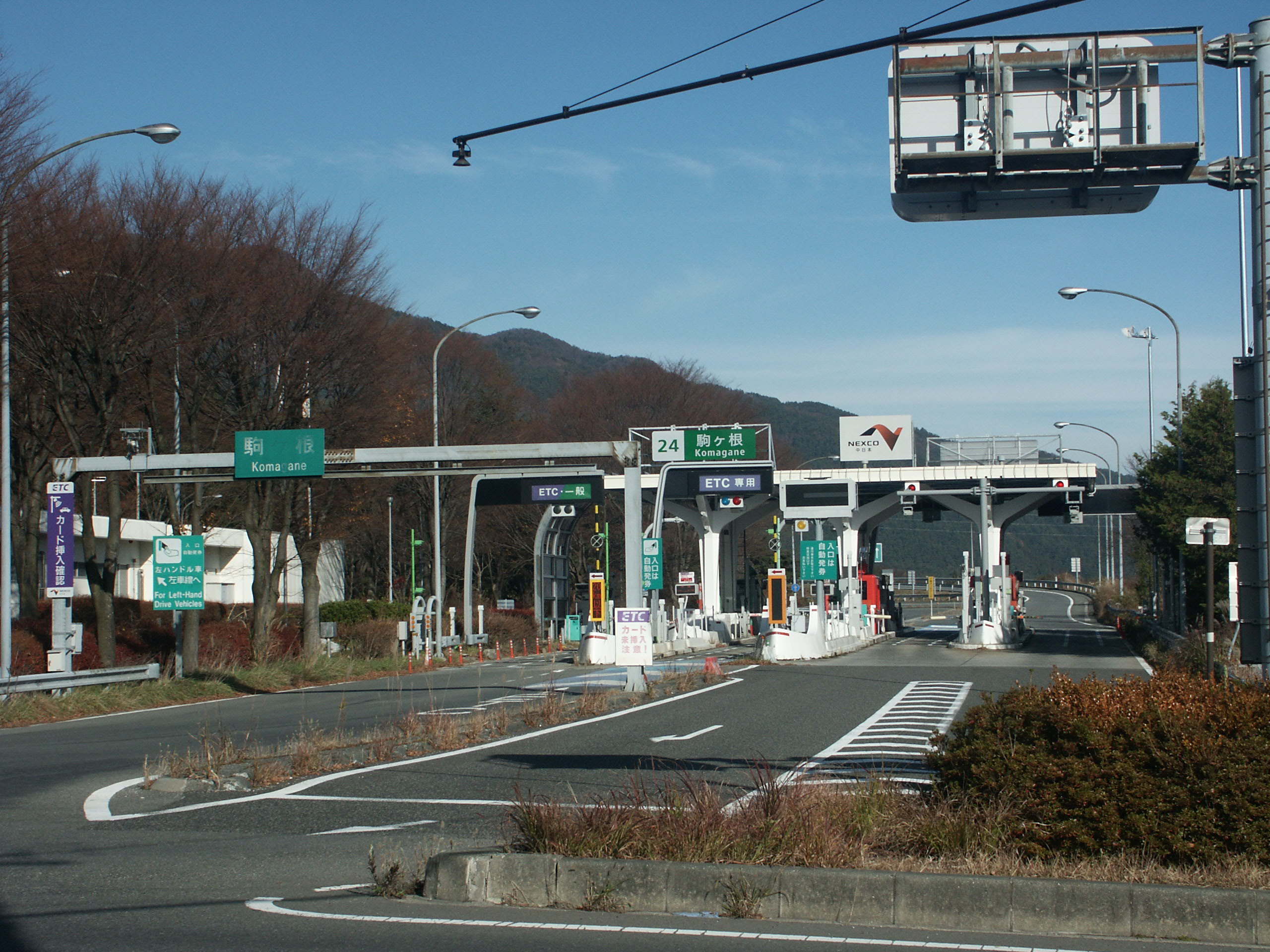 中央自動車道駒ヶ根インターチェンジ料金所（一般道から撮影）